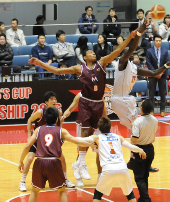 2016年全日本総合バスケットボール選手権大会二回戦、サイバーダインつくばロボッツ対明成高校。代々木第一体育館で。